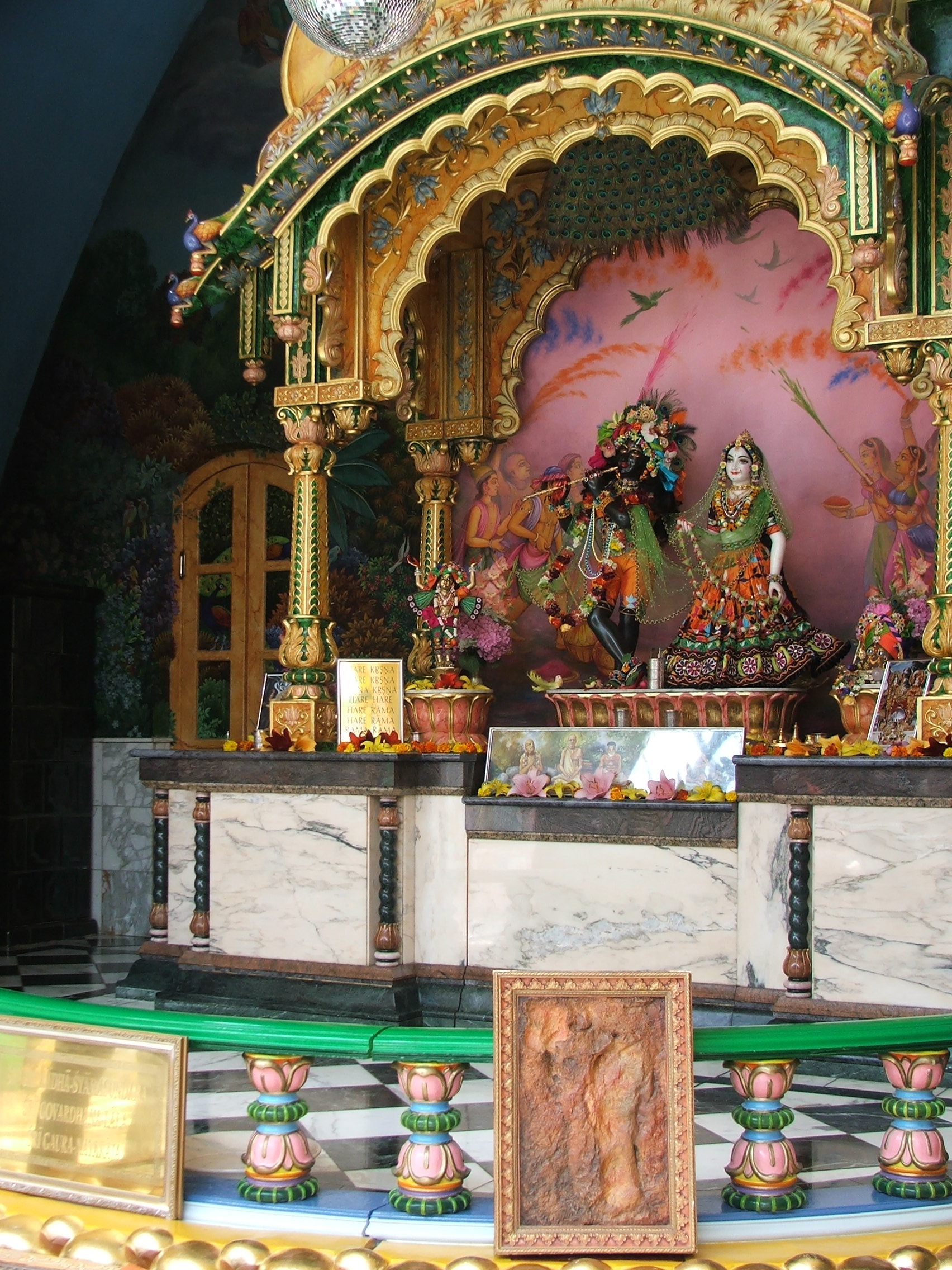 Somogyvámos, Krisna-völgy, templom, Krisna szobor